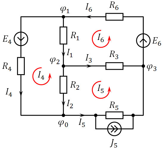 Пример электрической схемы. Выделение системы независимых контуров методом планарного графа.